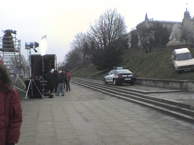 Template:PlKręcenie serialu Determinator w Lublinie